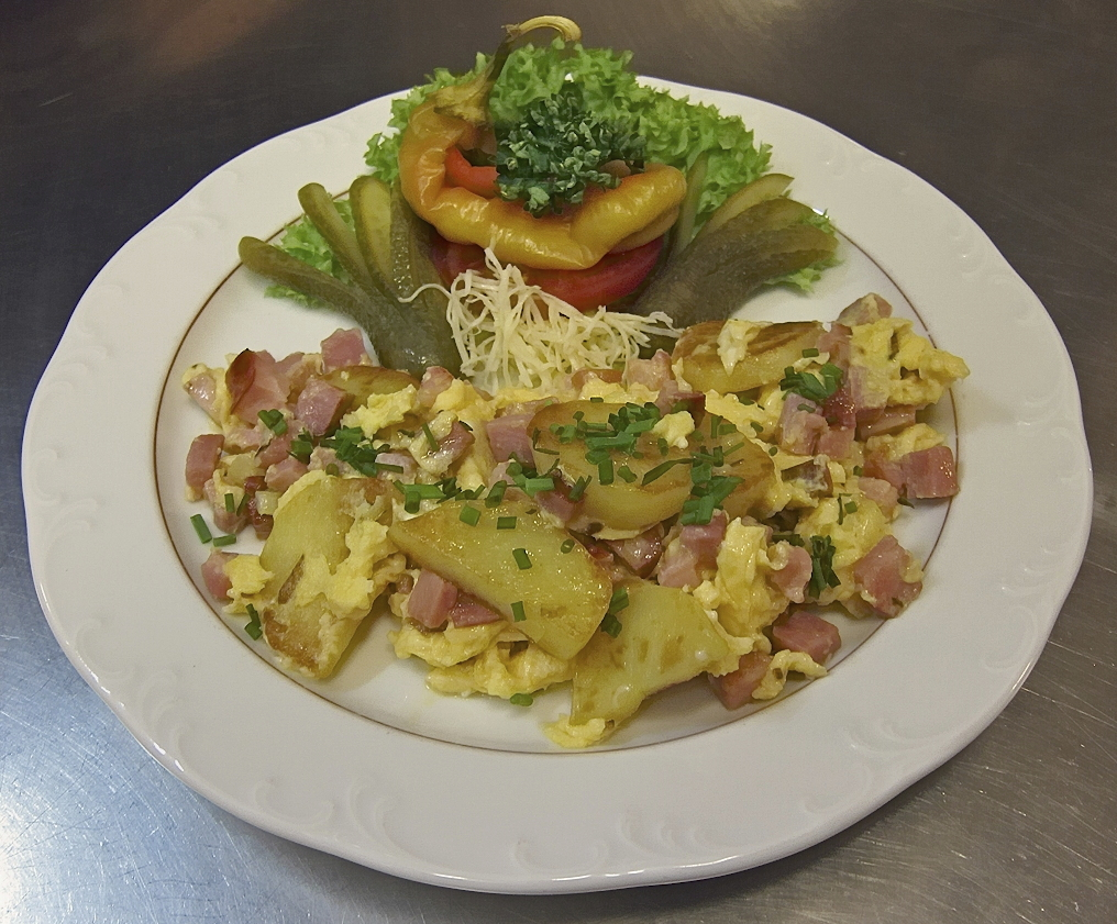 Bauernfrühstück, hier mit Bratkartoffeln, Rührei, Selchfleisch und Zwiebeln, dazu Gewürzgurken und Garnitur.